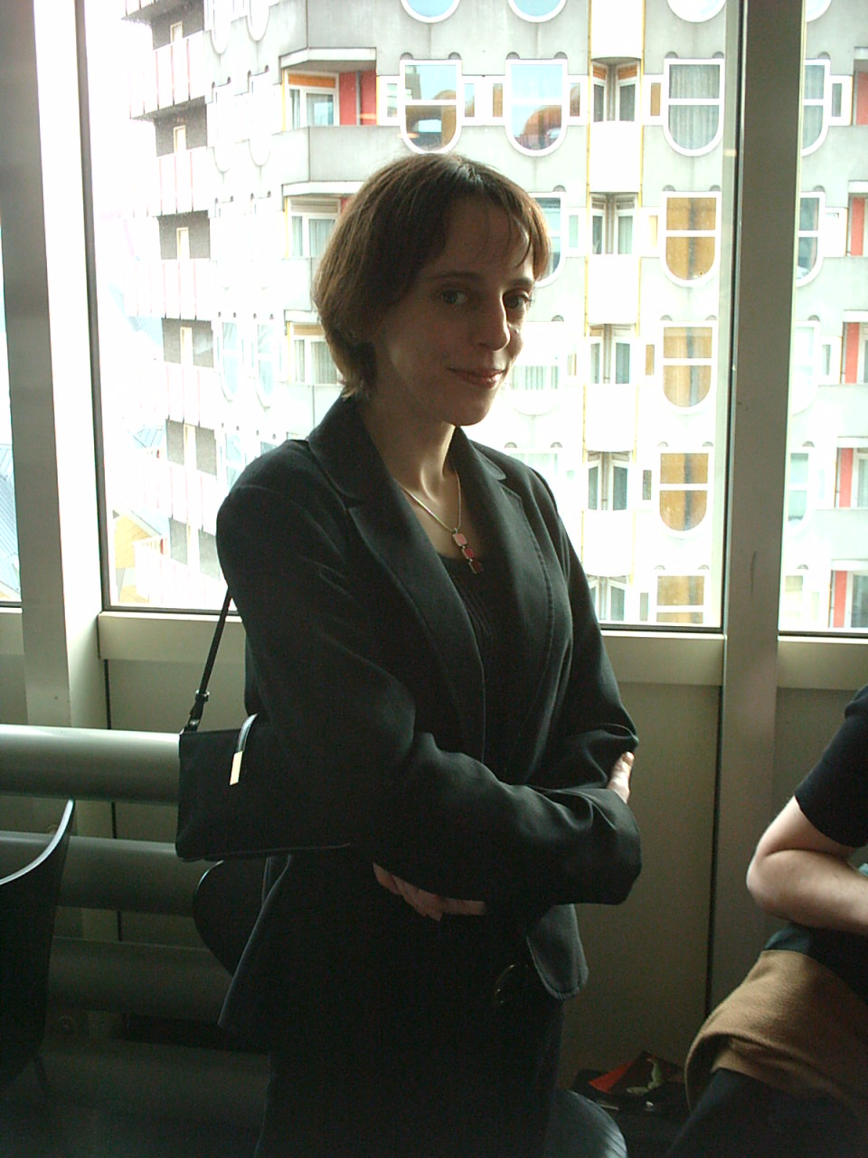 Foto van het Wikipedia-symposium in Rotterdam, novermber 2004. Angela. Foto: Andre Engels